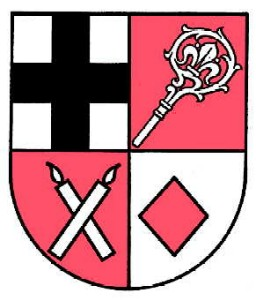 Wappen von Mosbruch.